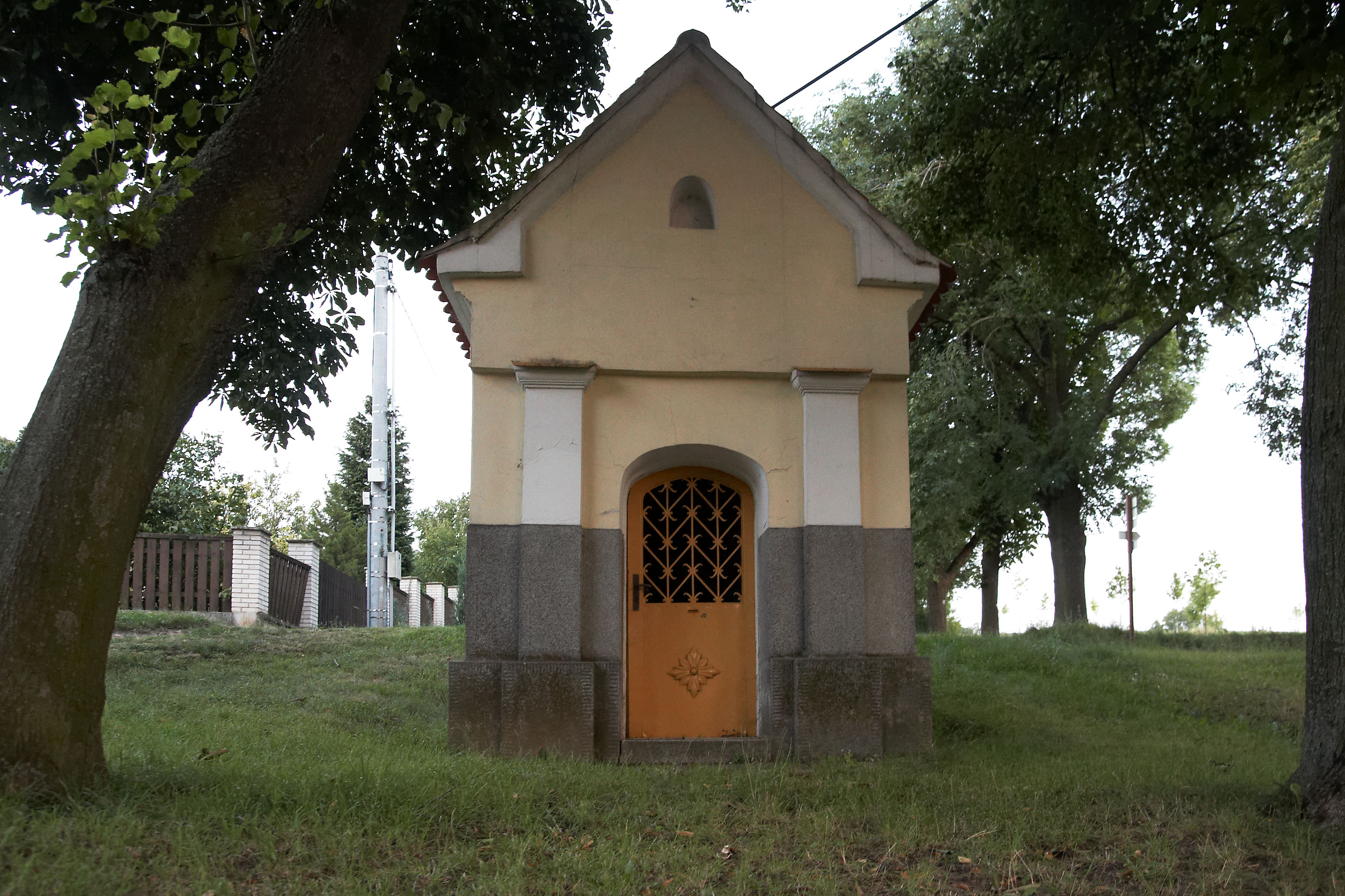 Němčany, Lutršték, kaplička pod kaplí P. Marie Sedmibolestné